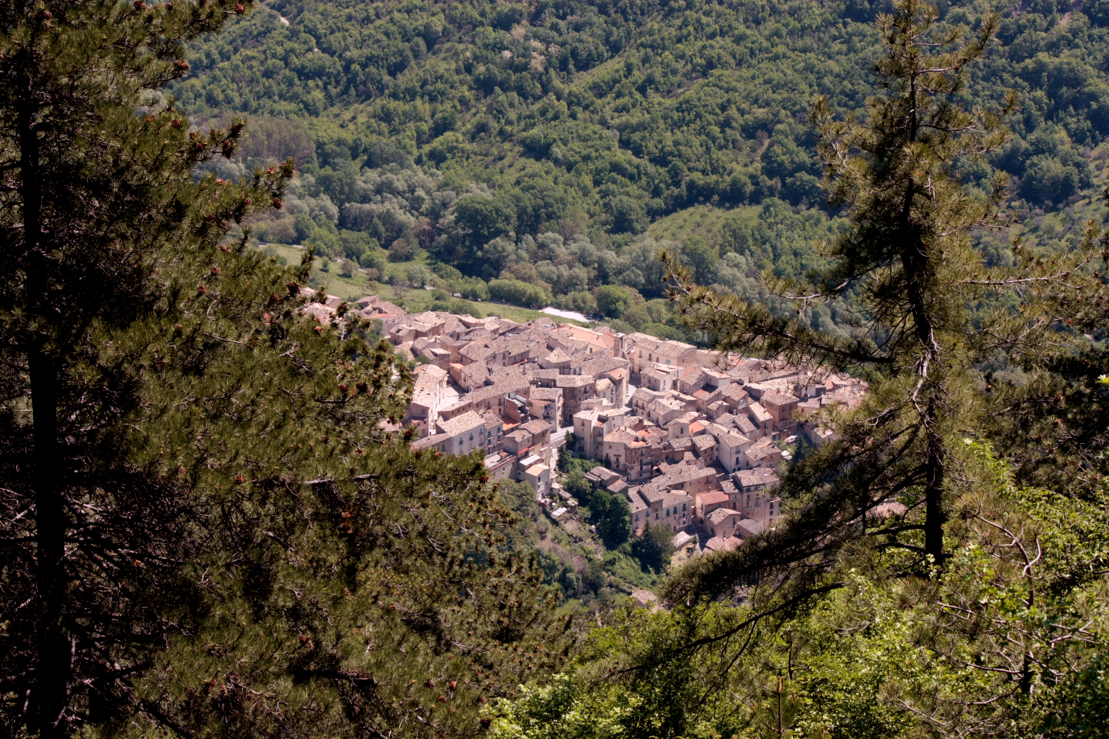 Gole del Sagittario This is a photo of a monument which is part of cultural heritage of Italy. The authorisation for taking photos of this object was provided by the World Wide Fund for Nature Italy.